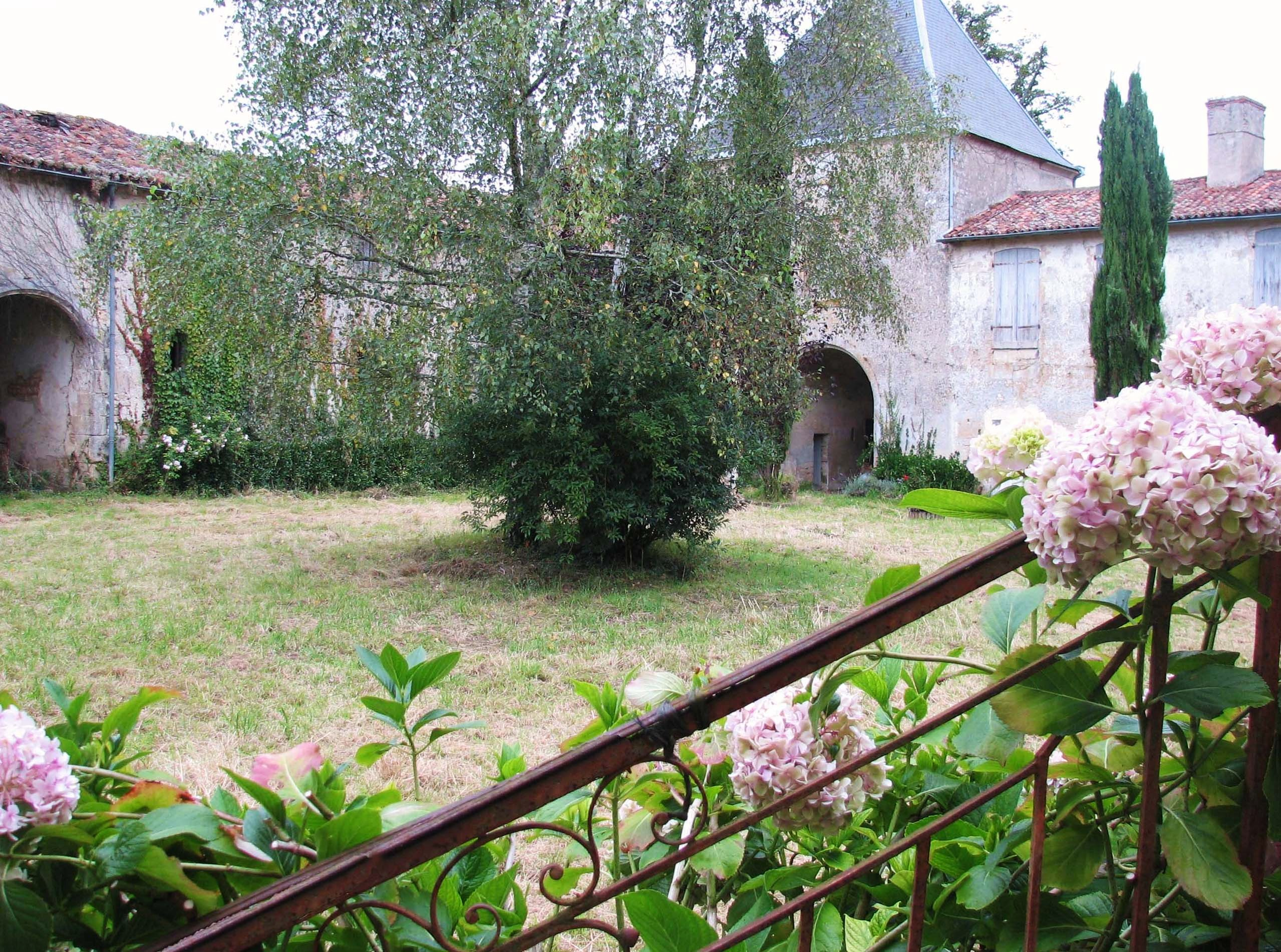 Château du bourg - Cour intérieure